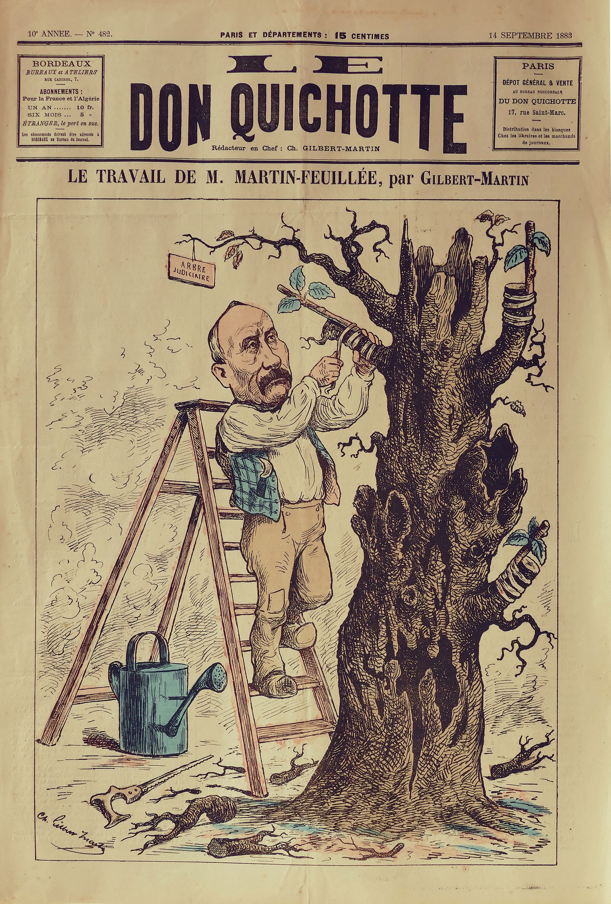 Le Don Quichotte n°482 du 14 septembre 1883, Félix Martin-Feuillée, dessin de Charles Gilbert-Martin. Dimensions originale : 33,5 x 48,5 cm.